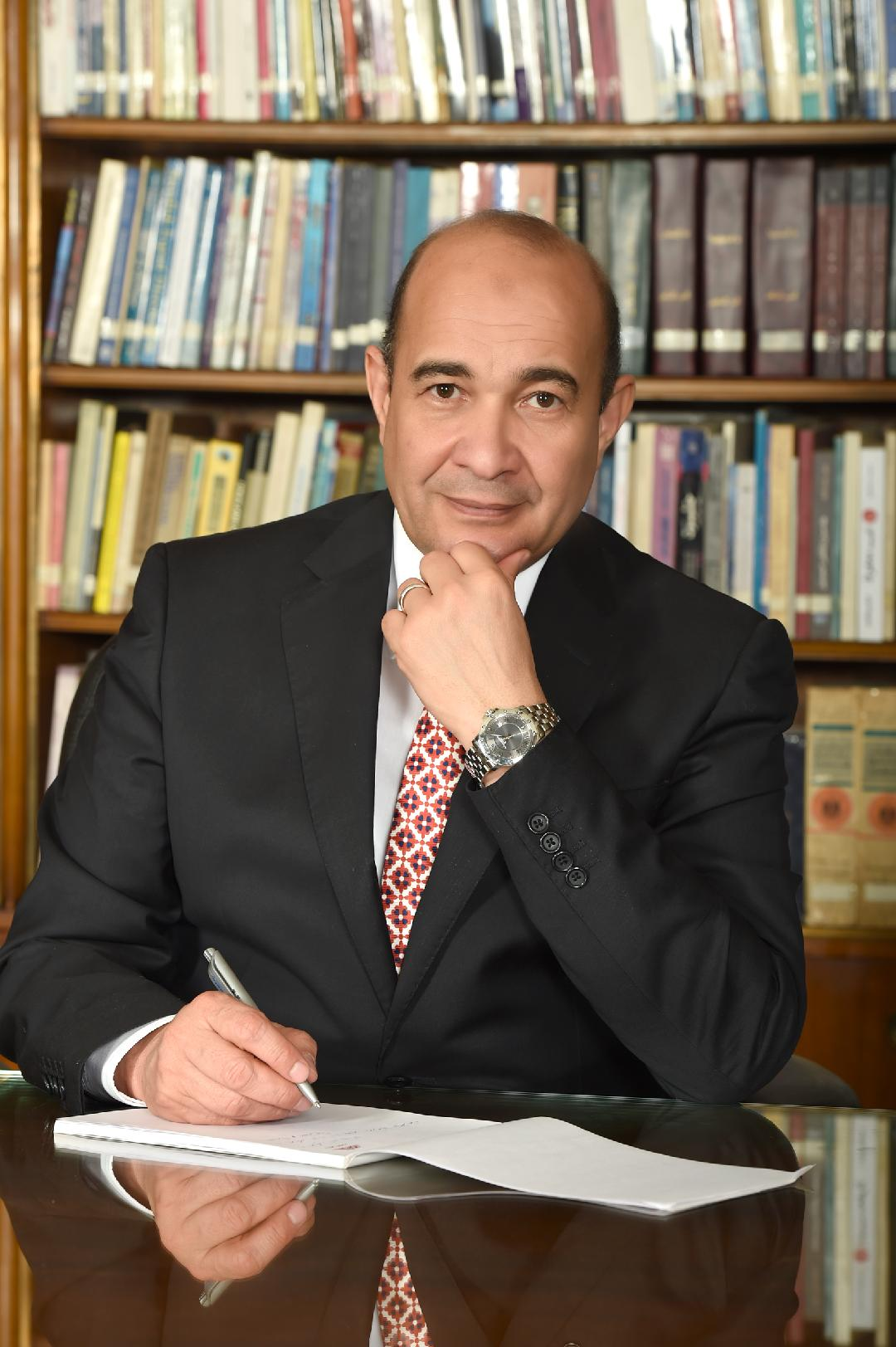 كاتب صحفي يشغل حاليا منصب رئيس تحرير جريدة الأهرام ــ عضو مجلس إدارة بمؤسسة الأهرام